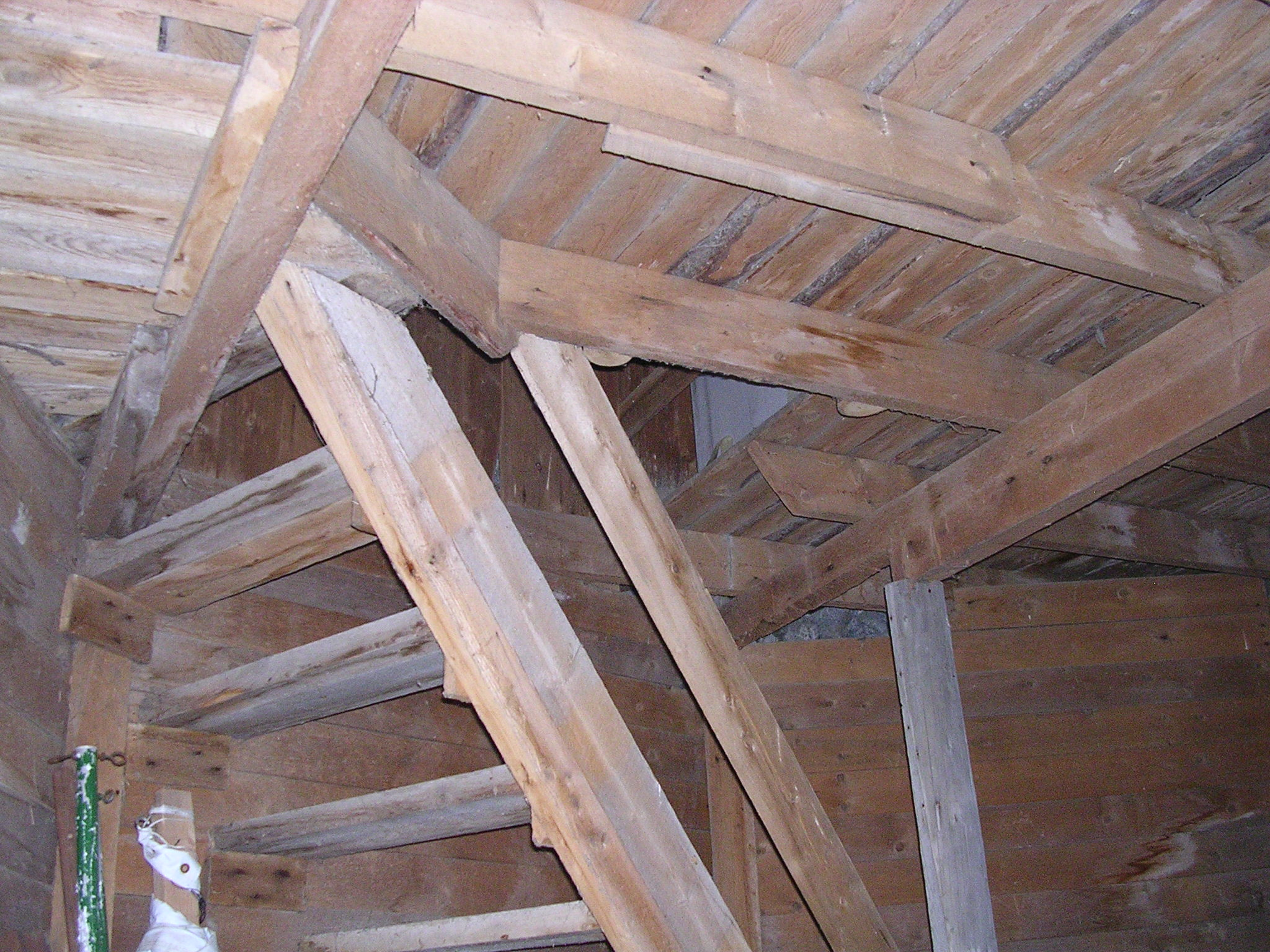 Intérieur du moulin Voyer à Neuville (Québec). Ce moulin est une reconstitution d'un moulin à vent inspiré du moulin à vent de l'Île-aux-Coudres. Le nom Voyer est celui de ses constructeurs.